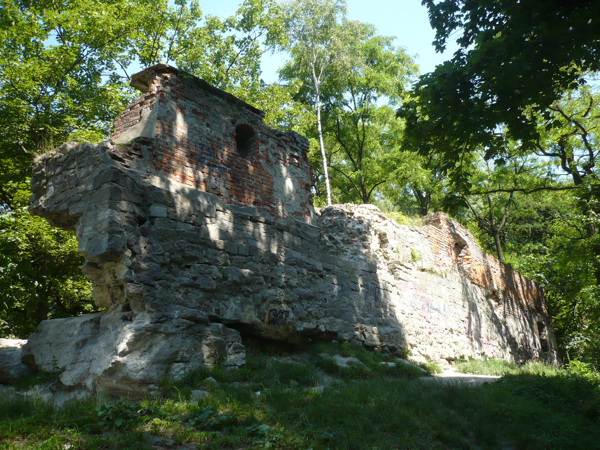 Lwów. Wysoki Zamek